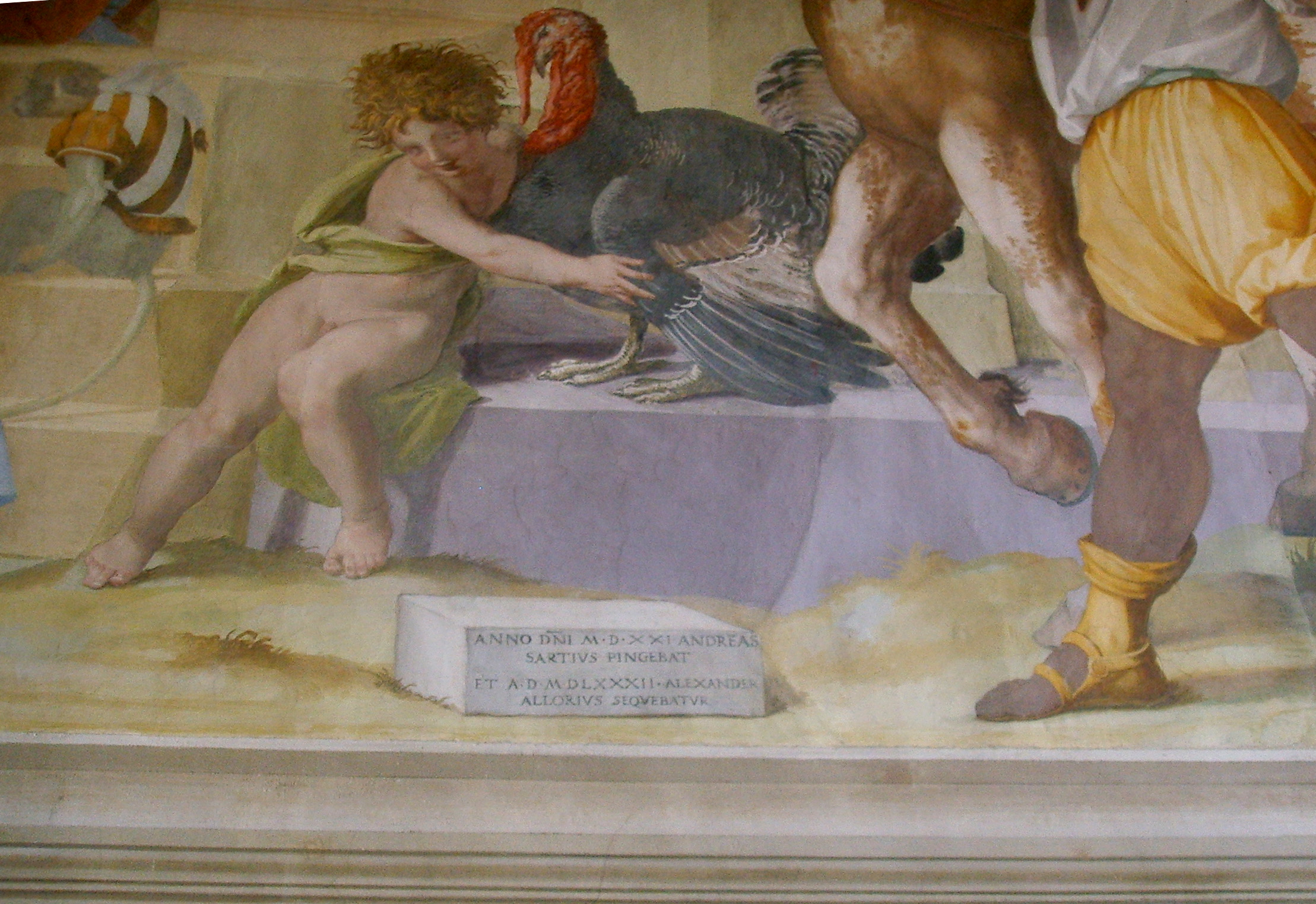 Villa medicea di Poggio a Caiano, inside sala di Leone X Fresco by Alessandro Allori and Andrea del Sarto (the signature) in Poggio a Caiano, Italy